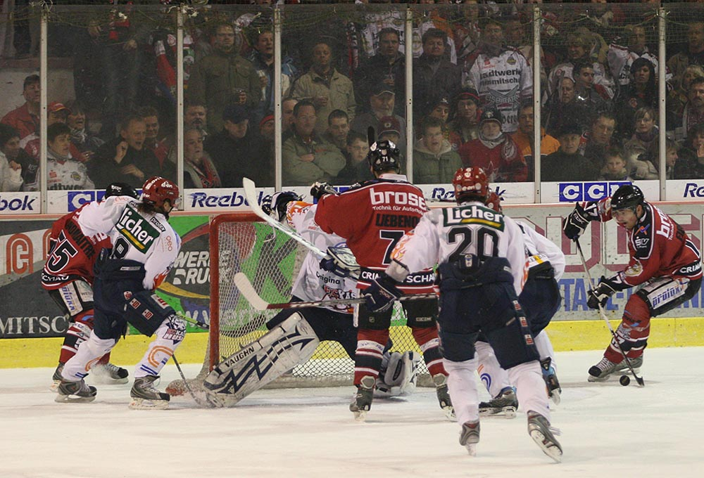 Eine Spielsituation beim Spiel Eispiraten Crimmitschau gegen Kassel Huskies